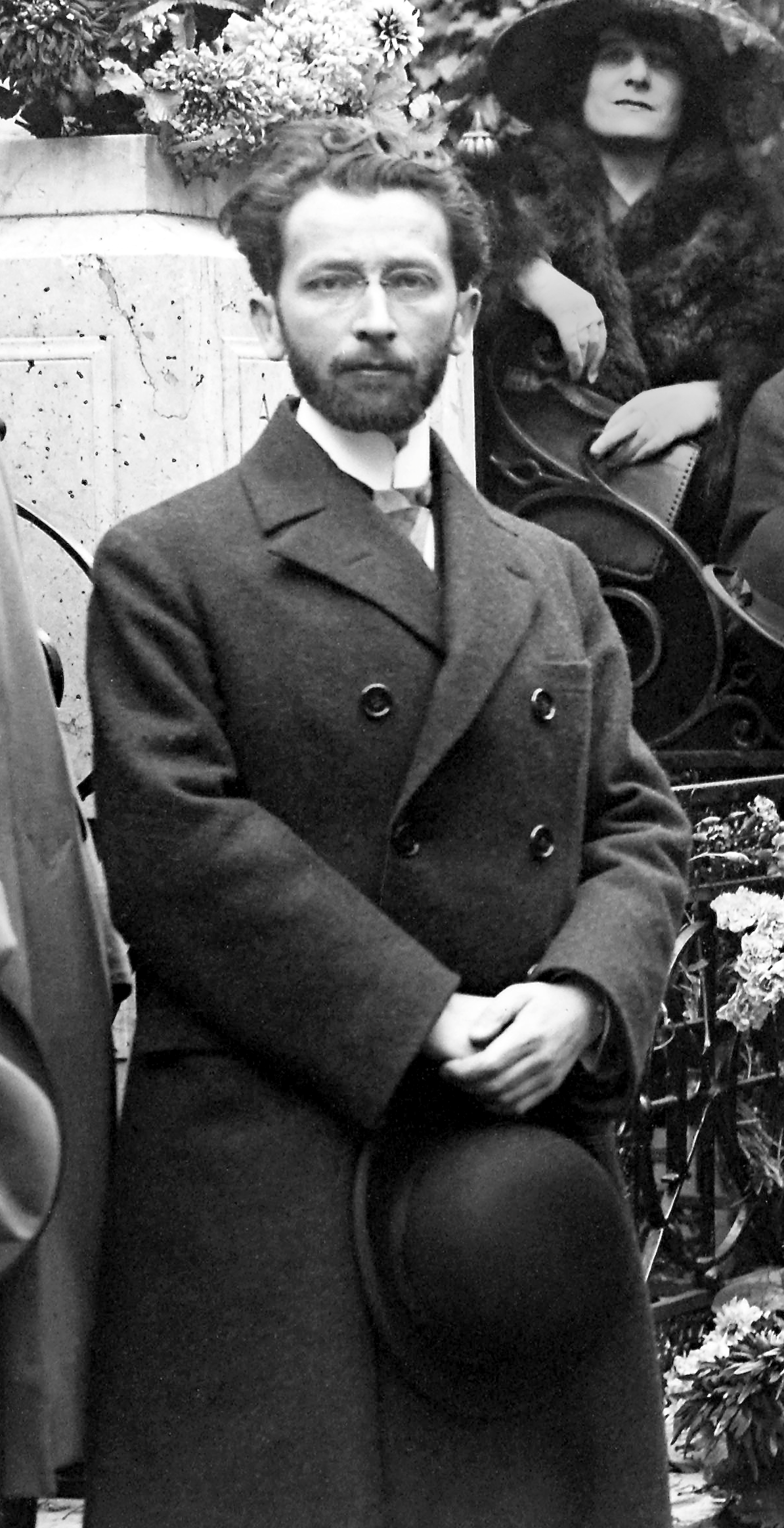 Édouard Ganche (1880-1945) le 23 octobre 1921 au cimetière du Père Lachaise, lors de la cérémonie du 72e anniversaire de la mort de Chopin, organisée par la Société Chopin. Photographie de presse, Agence Rol. Droits: Domaine public. Source: Bibliothèque nationale de France, département Estampes et photographie, EI-13 (833), via Gallica. Original: négatif sur verre 13 x 18 cm. Recadrage américain, légère amélioration du contraste et très léger nettoyage de quelques rayures.